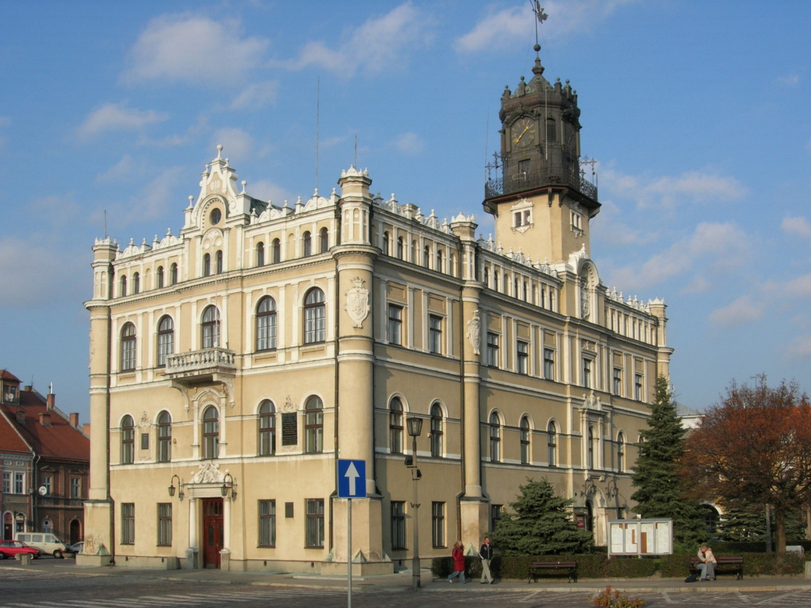 Jarosław (Poland), Ratusz